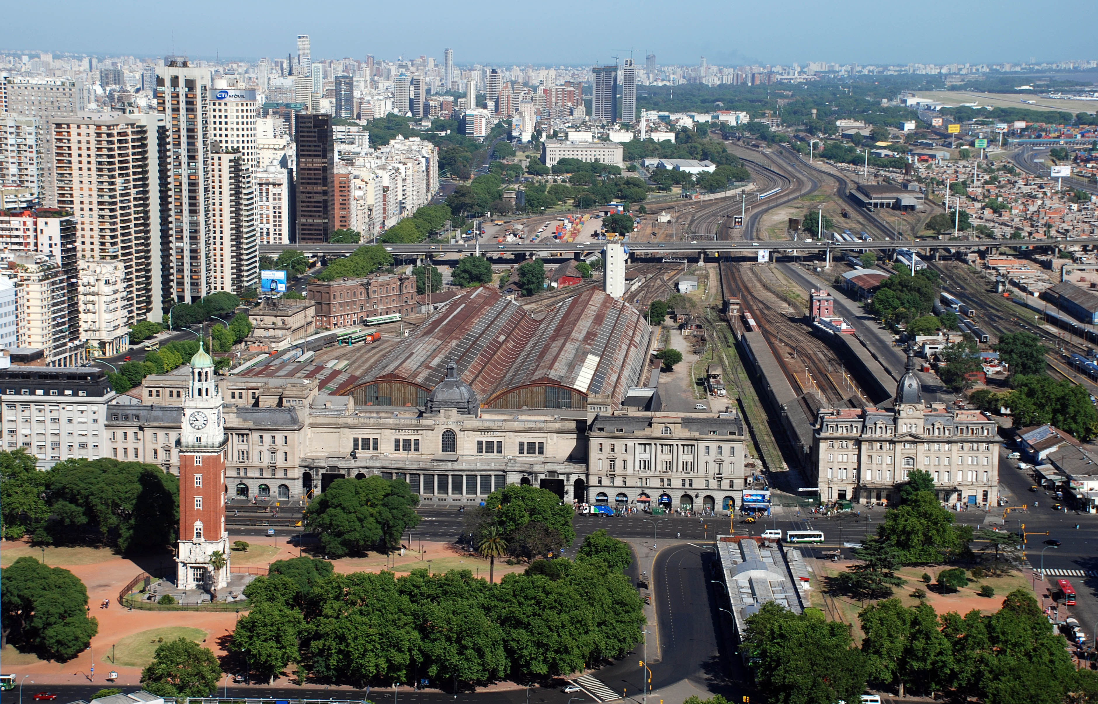 Área Retiro